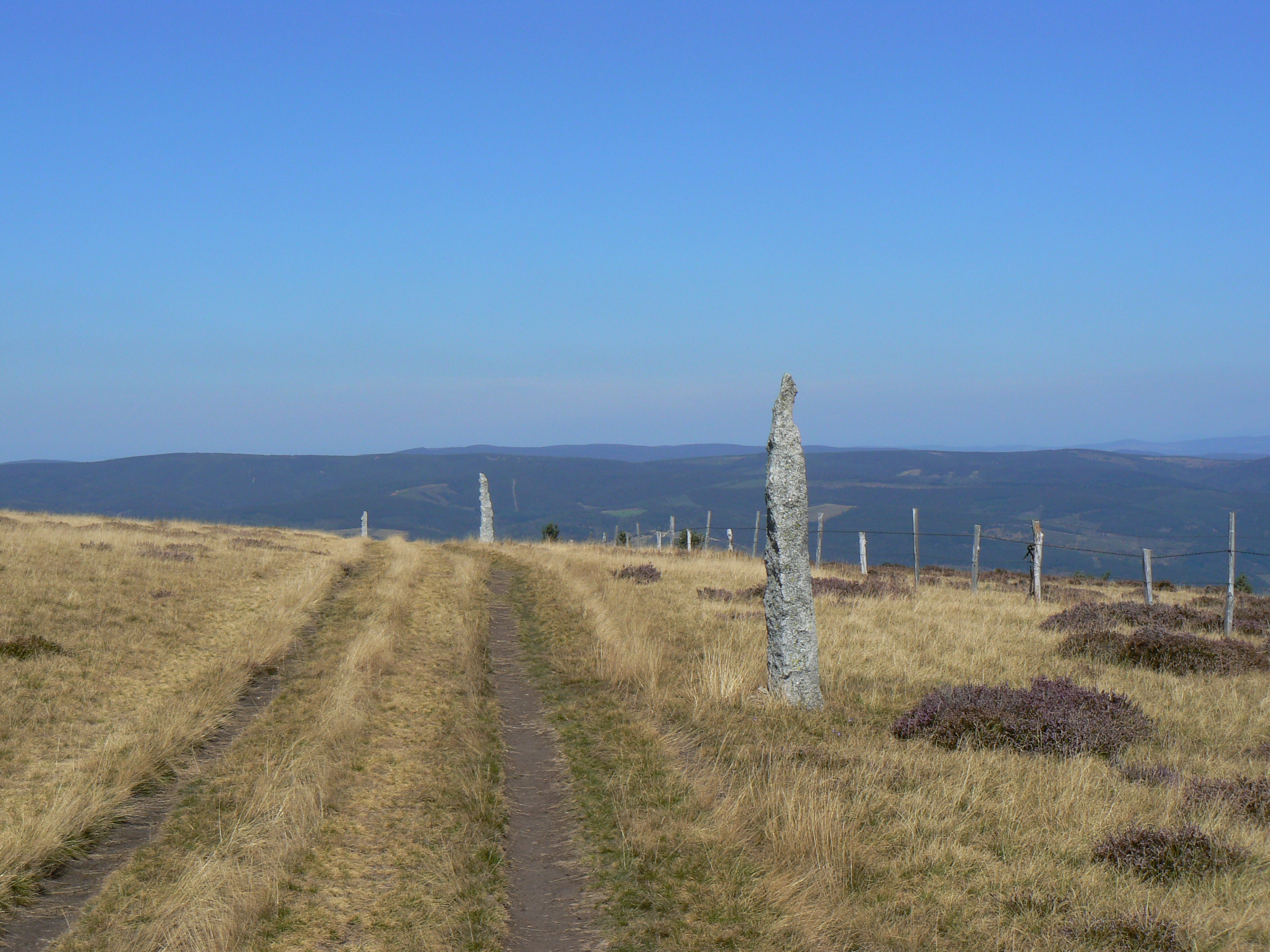 Montjoies sur la draille du mont Lozère en Lozère